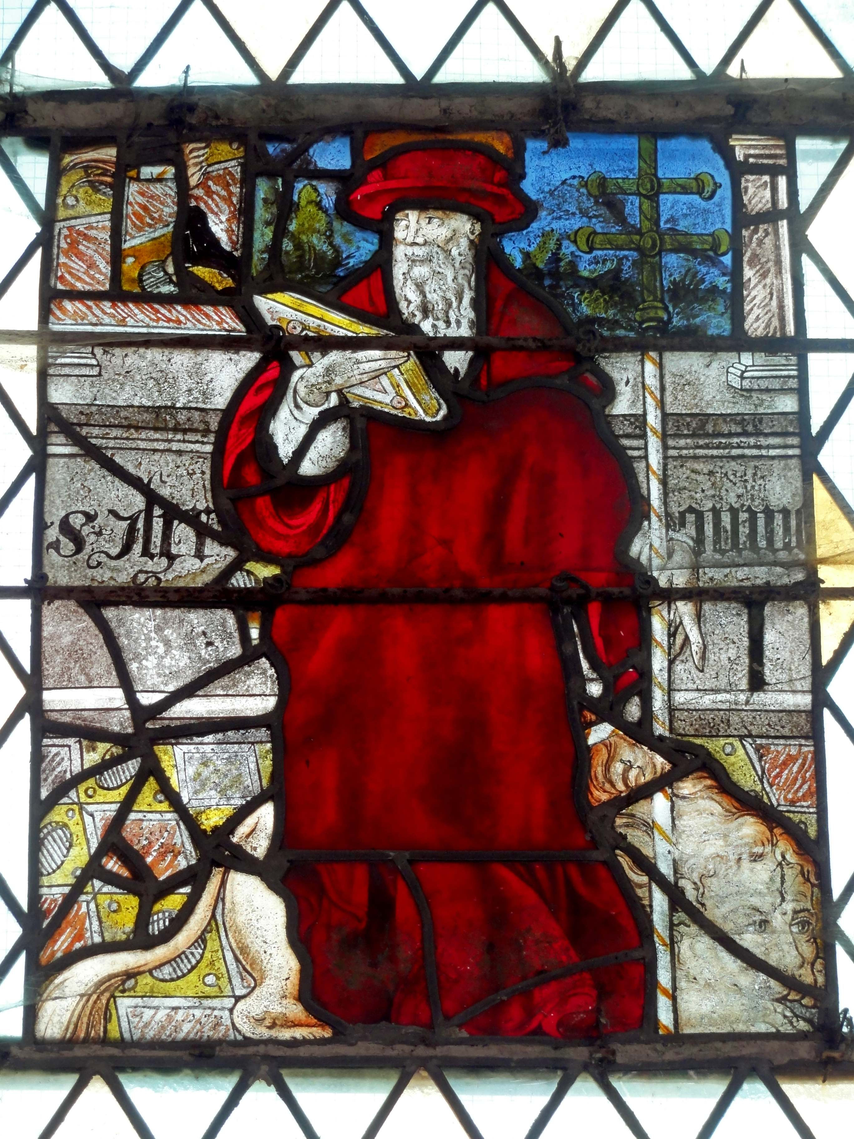 Verrière n° 1, lancette de droite - saint Jérôme.